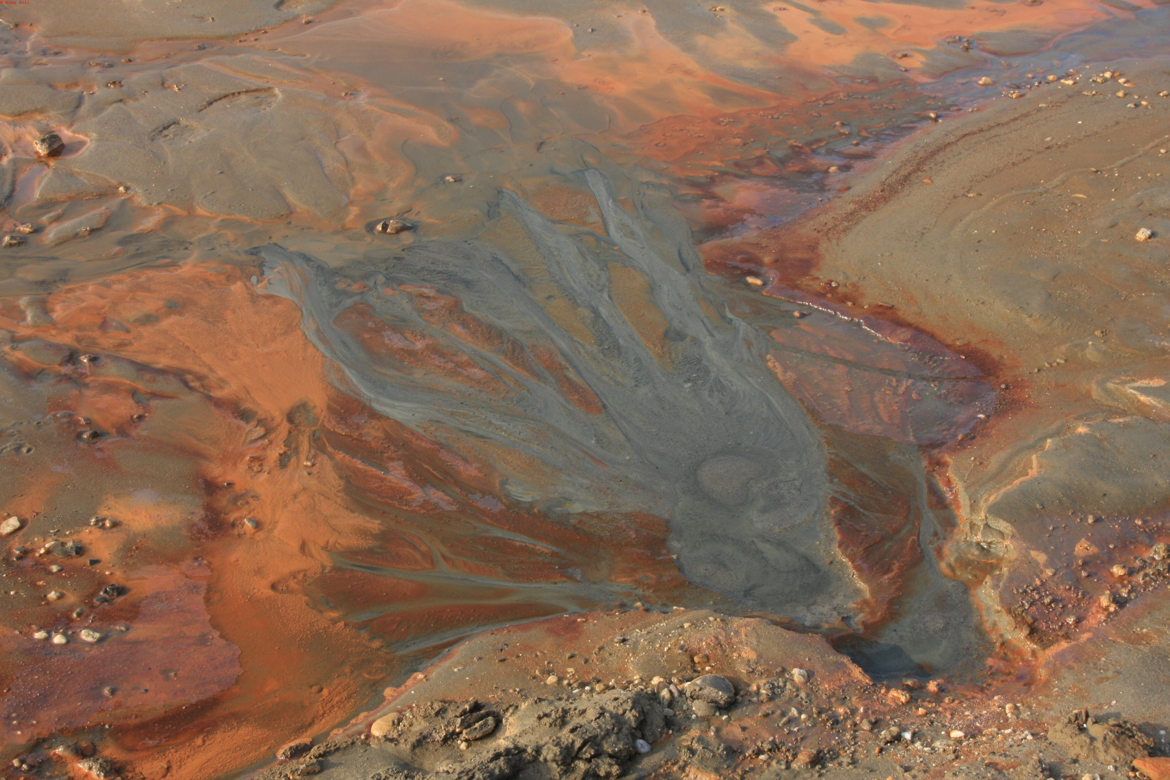 Miniatuurlandschappen ontstonden door erosie en roestvorming. Ijzerrijk grondwater komt in contact met zuurstof en oxideert (verroest). Bacteriën veroorzaken uiteenlopende kleuren.